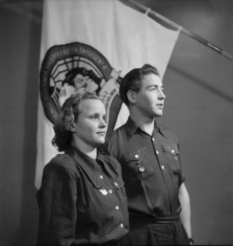 Zentralbild Angehörige der FDJ vor der Weltjugendfahne